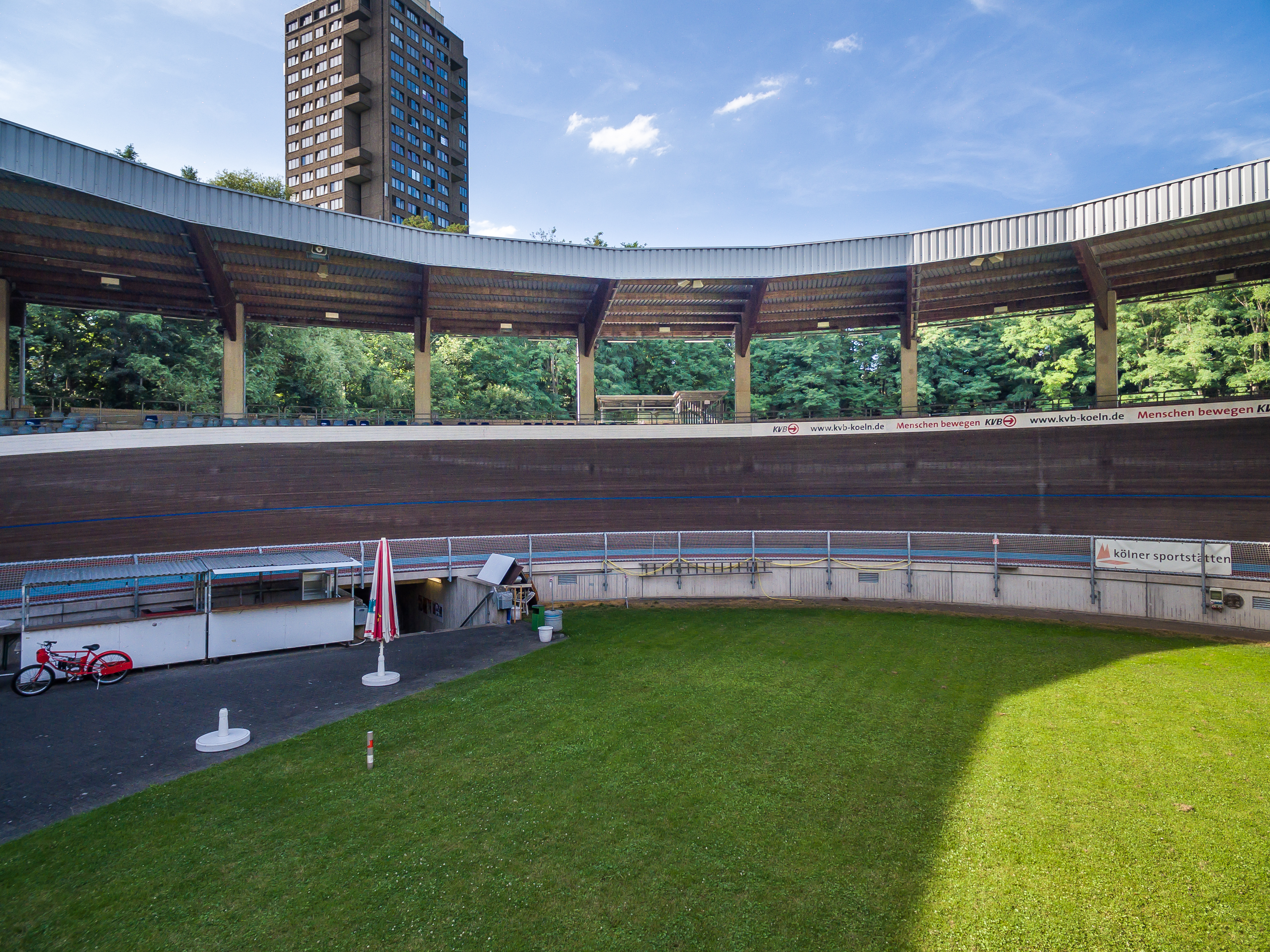 Radstadion Köln im Sportpark Müngersdorf